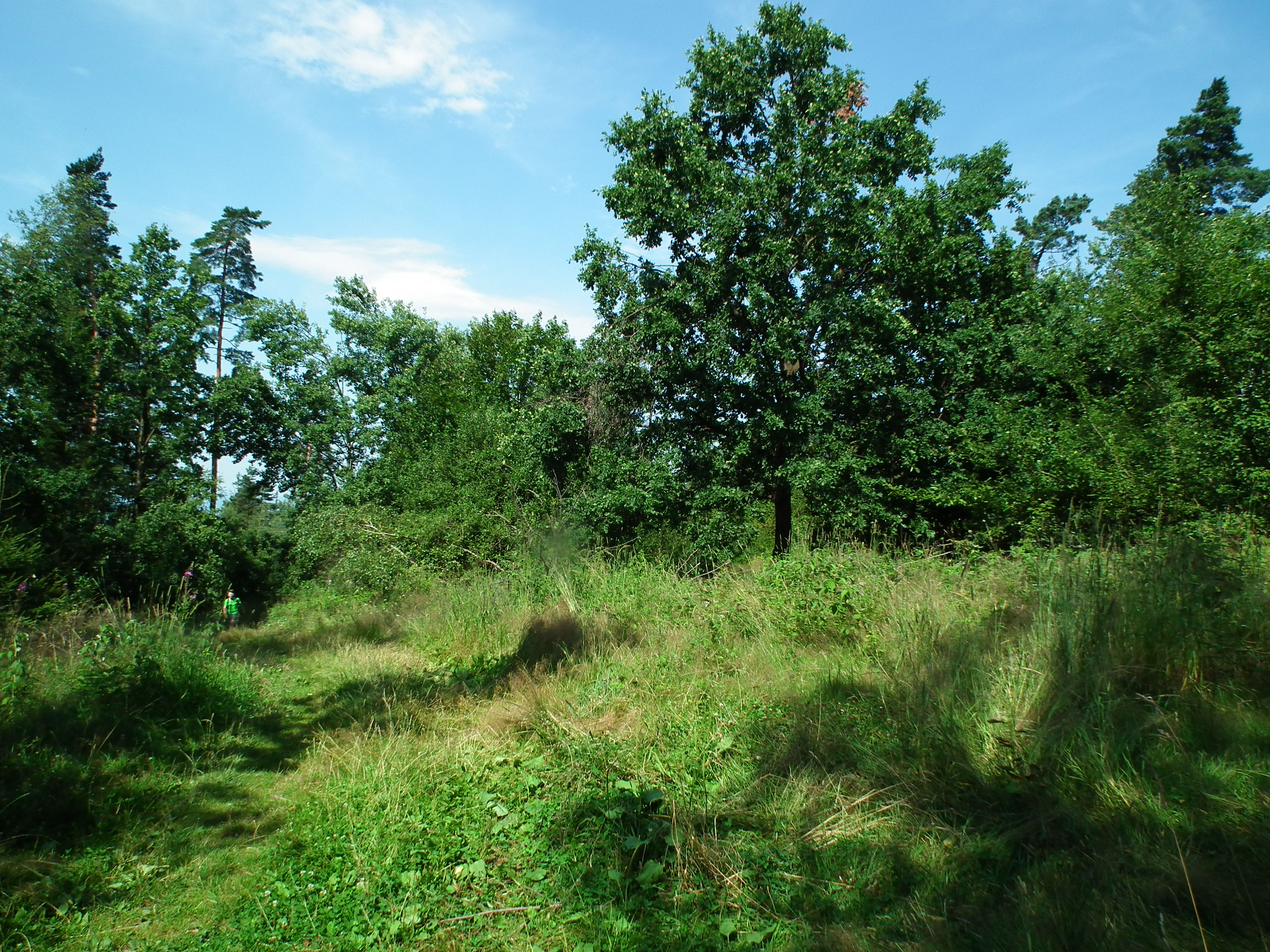 Szczyt Bania w Rabce.